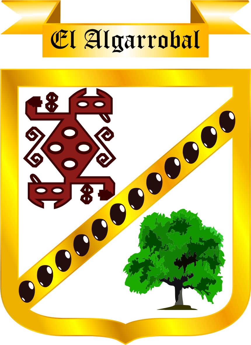 Distrito de El Algarrobal - Provincia de Ilo - Región Moquegua